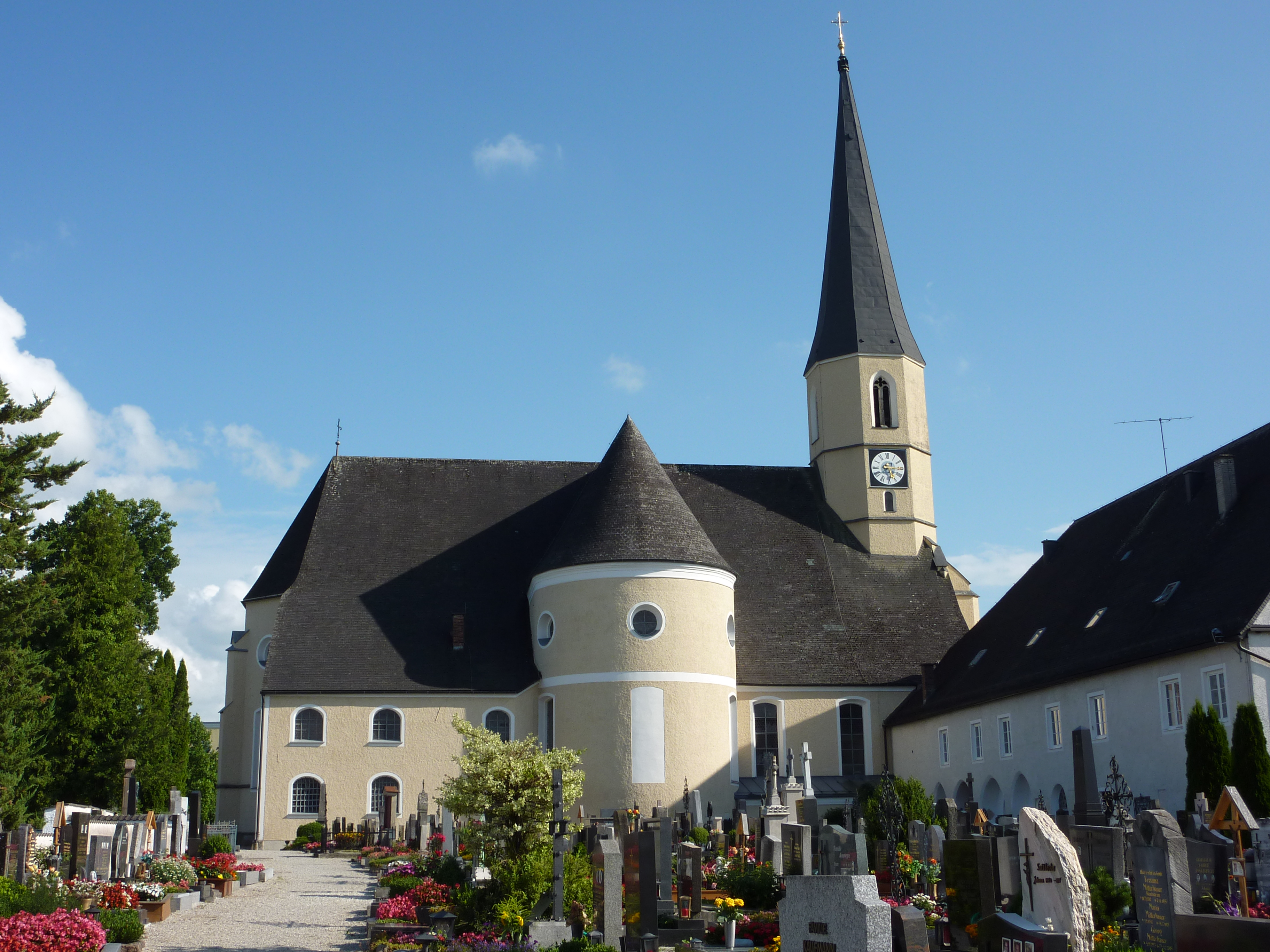 Pfarrkirche in Mattighofen in Oberösterreich - Nordseite; rechts Teil des Pfarrhofs/Propsteigebäudes